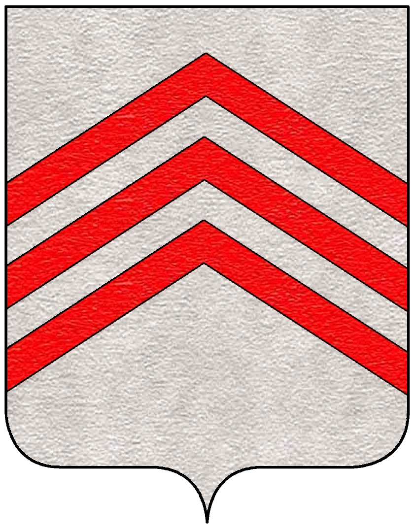 Stemma della famiglia Richelieu